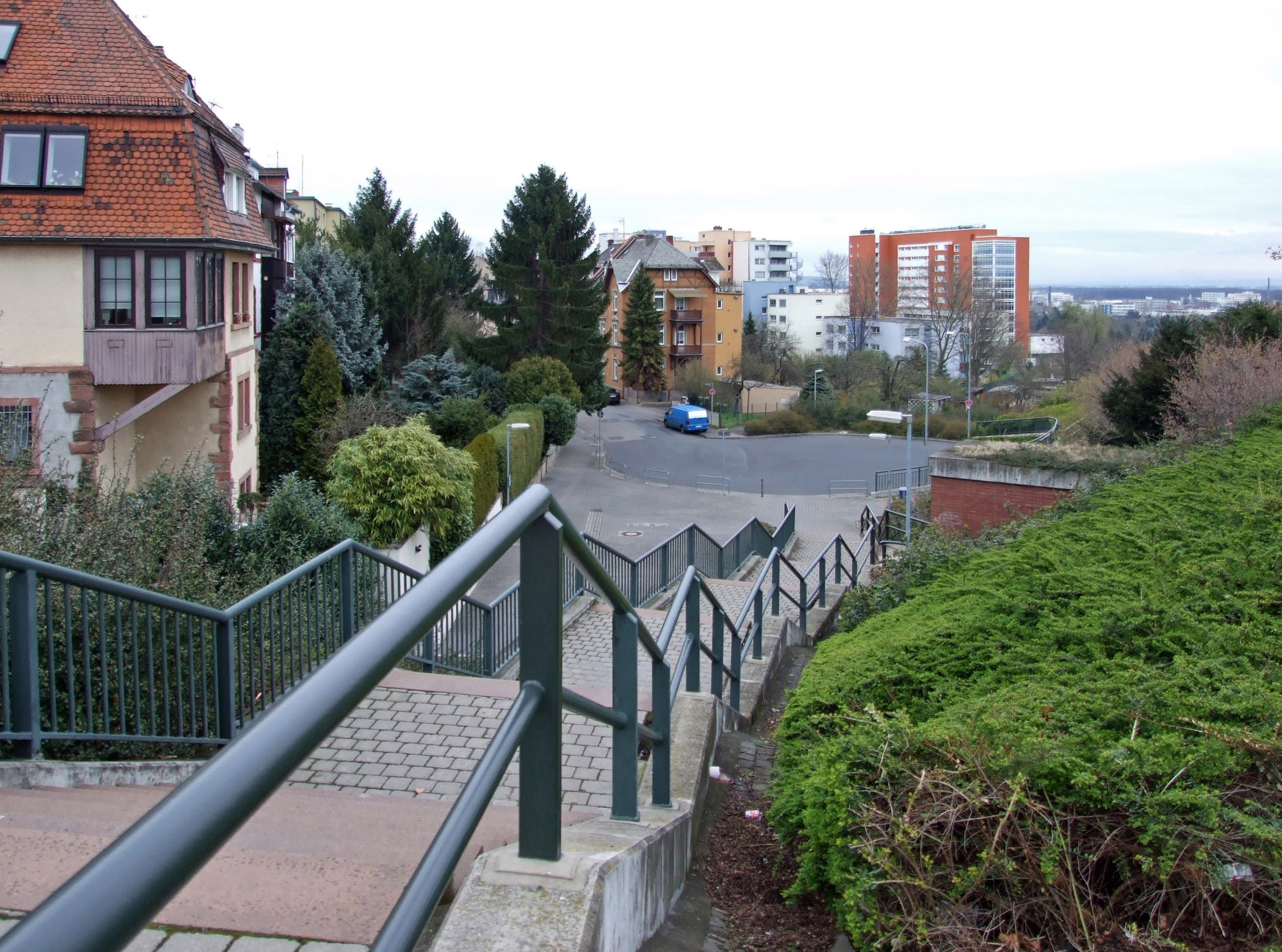 Anfang der „Wilhelmshoeher Strasse“ (am Fuss der Treppe) hinter der „Einhausung“ der „A 661“ in Ffm-Seckbach